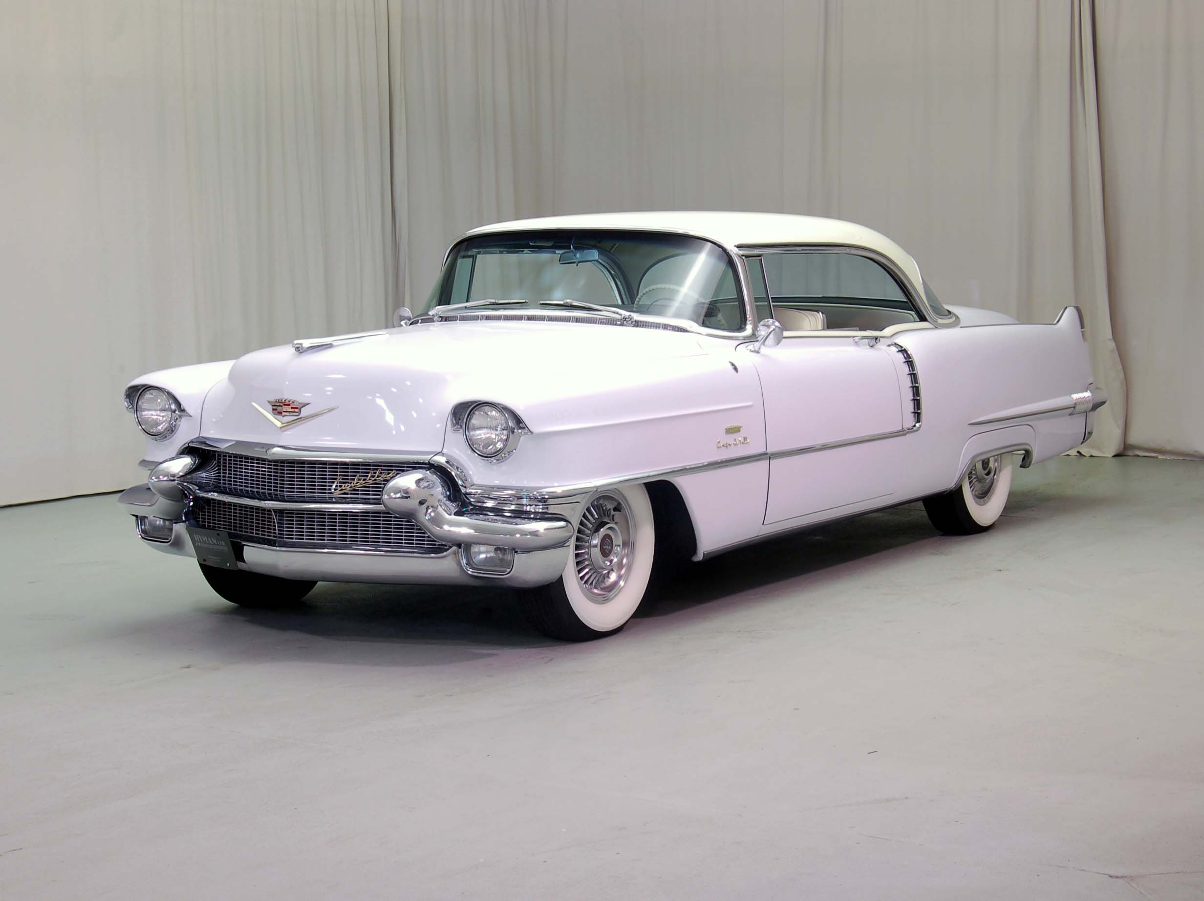 en:1956 Cadillac Coupe DeVille